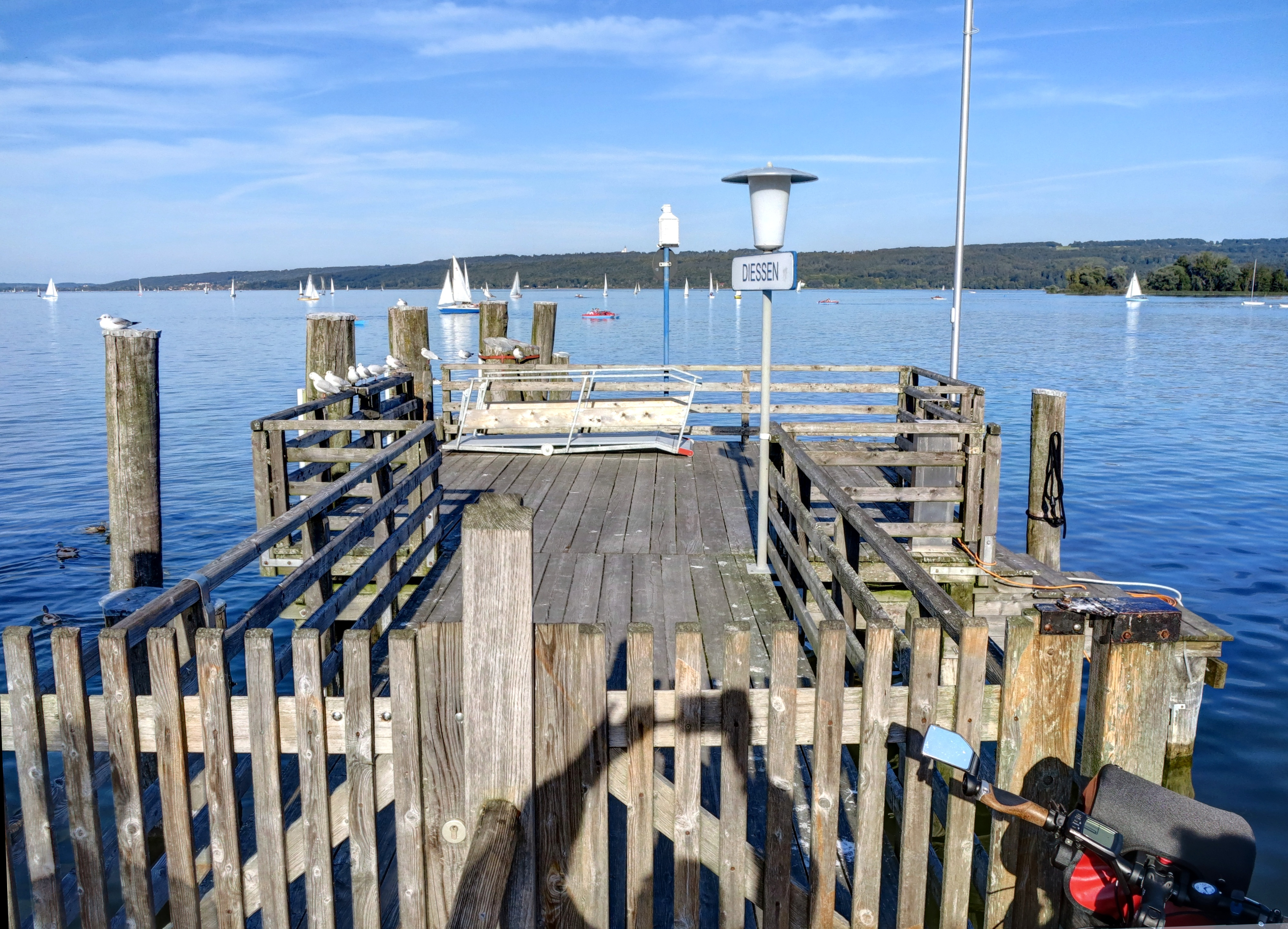 Deutschland, Bayern, Dießen, Bootsanlegesteg